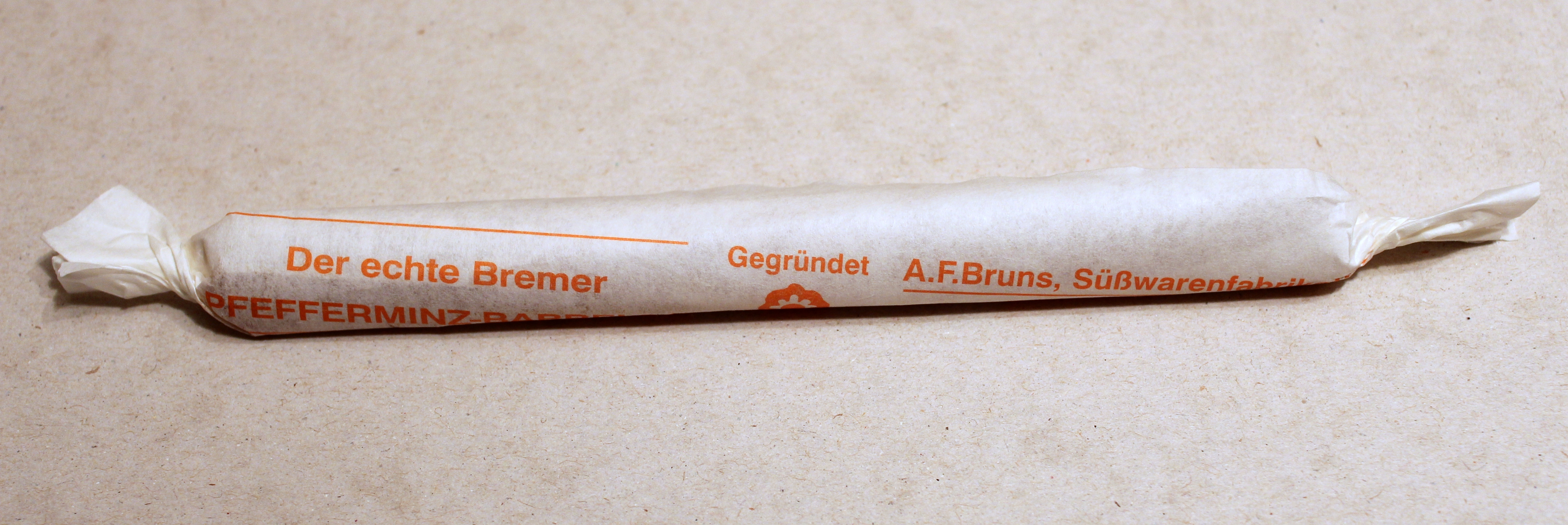 eingepackter Bremer Babbeler